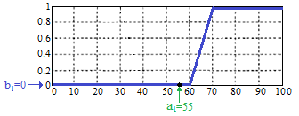 рис3